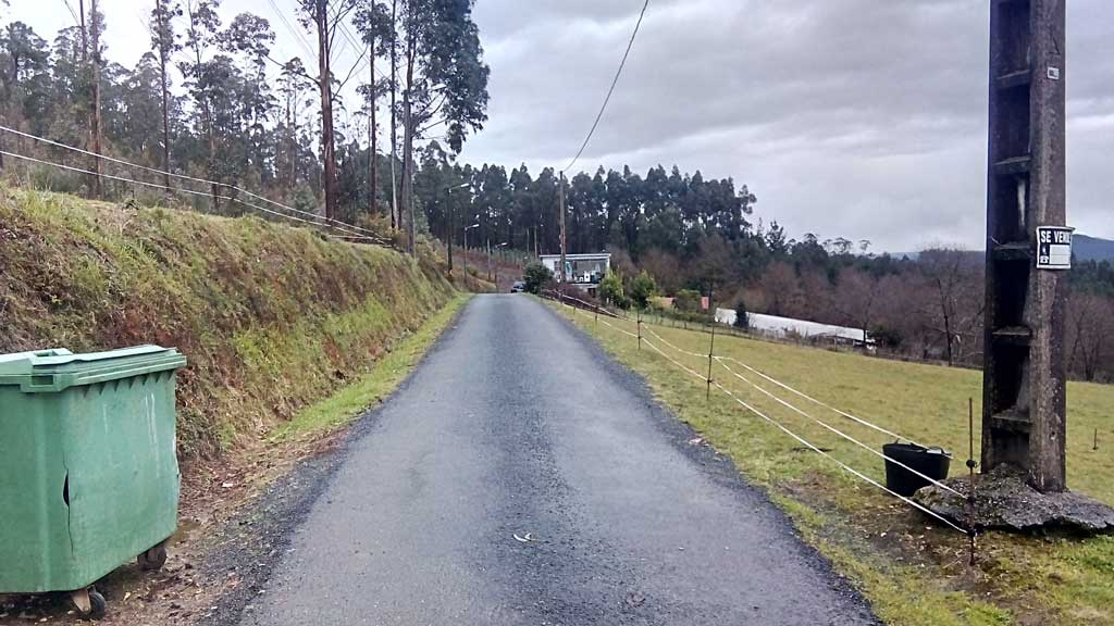 Acceso á Vacariza, Pedroso, Narón.